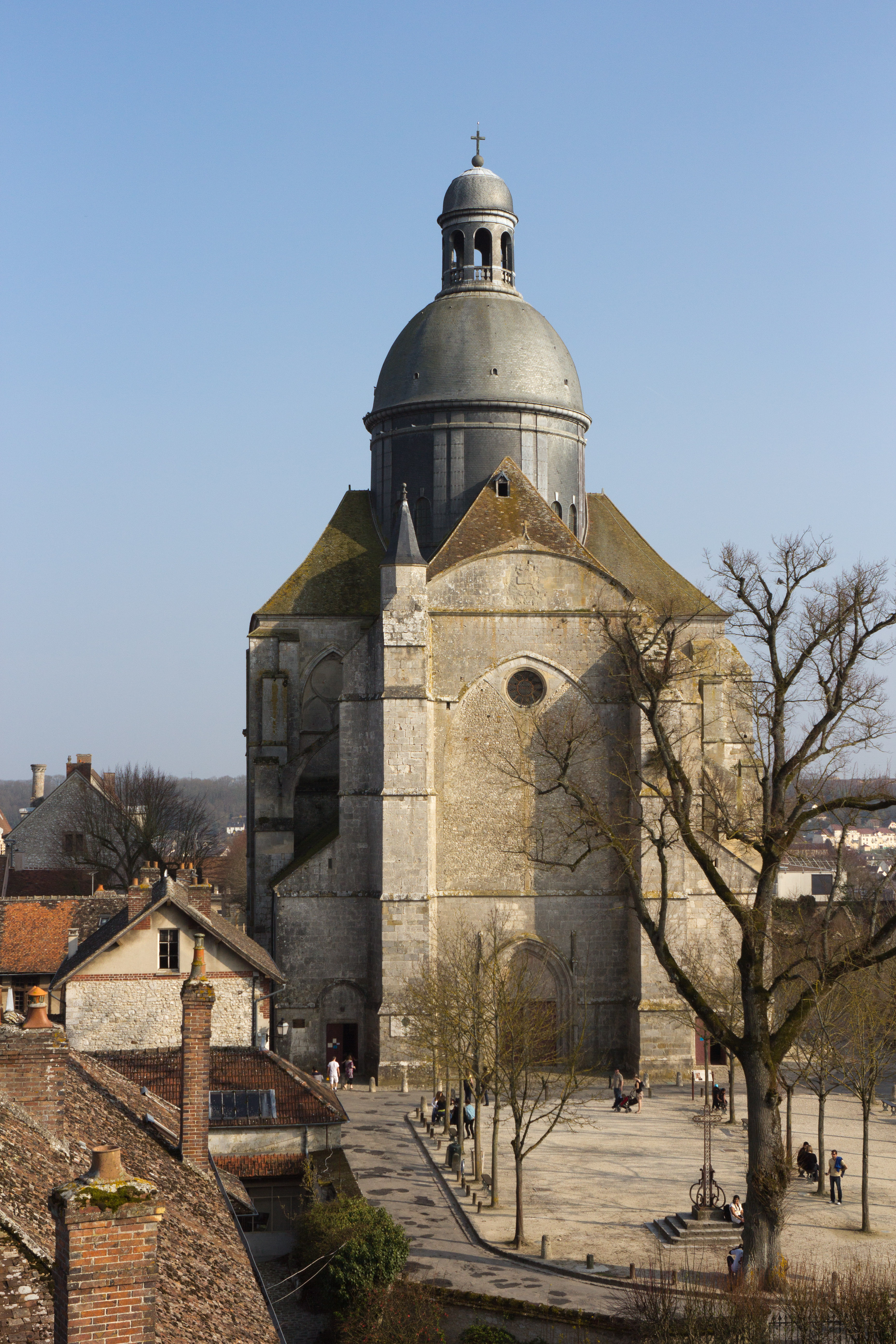 Collégiale Saint-Quiriace, Provins, département de Seine-et-Marne, France